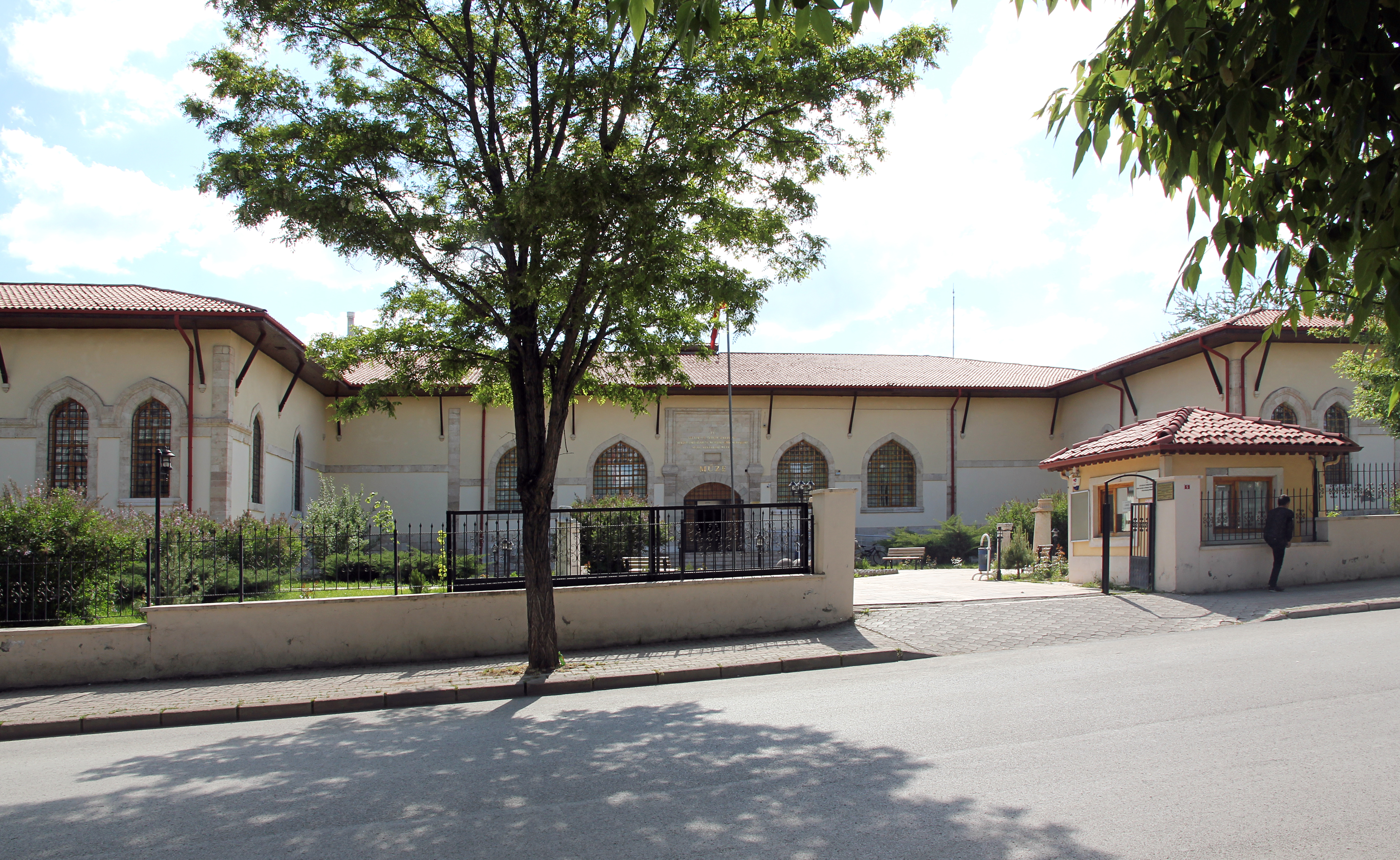 Archäologisches Museum Sivas, Zentraltürkei